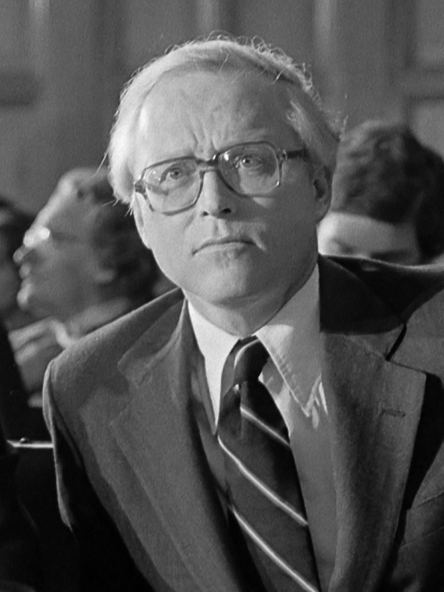 De delegatie van de Verenigde Staten, in het midden Minister van justitie Benjamin Civiletti 10 december 1979